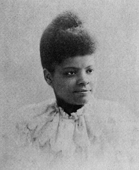 Ida B. Wells Barnett (1862-1931)